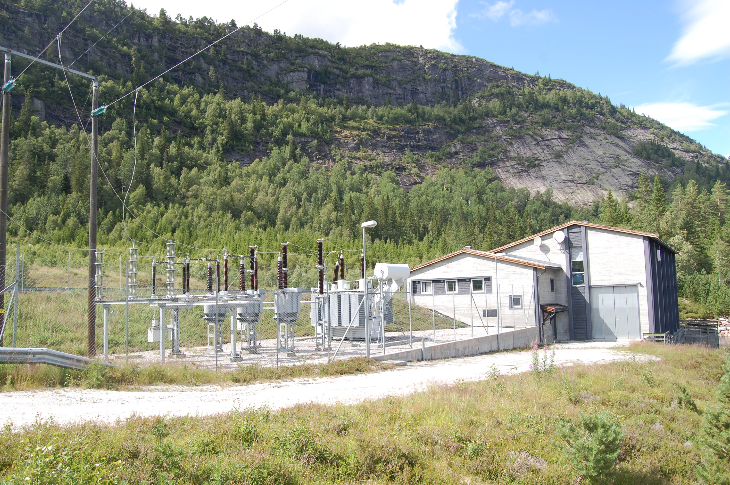 Haukrei kraftverk i Fyresdal